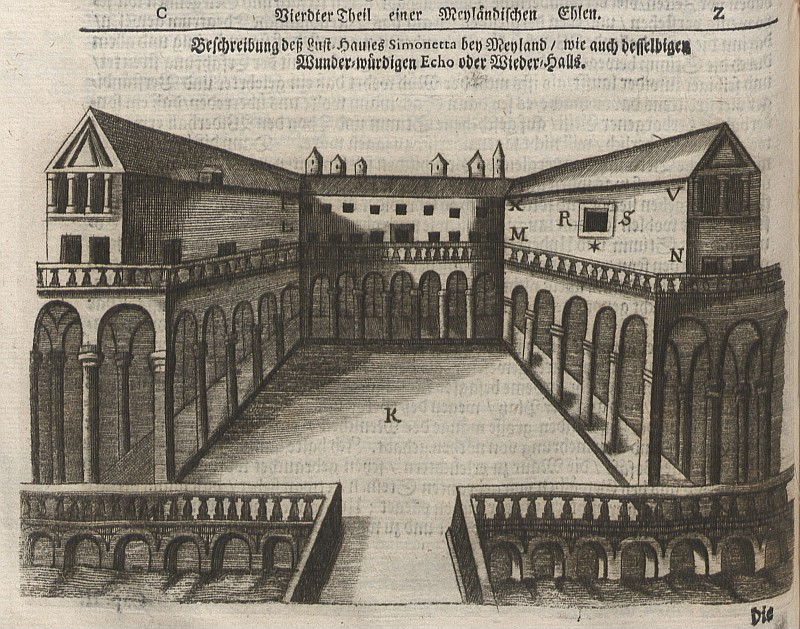 Original image description from the Deutsche Fotothek Akustik & Architektur & Schall & Echo & Villa & Ordensliteratur